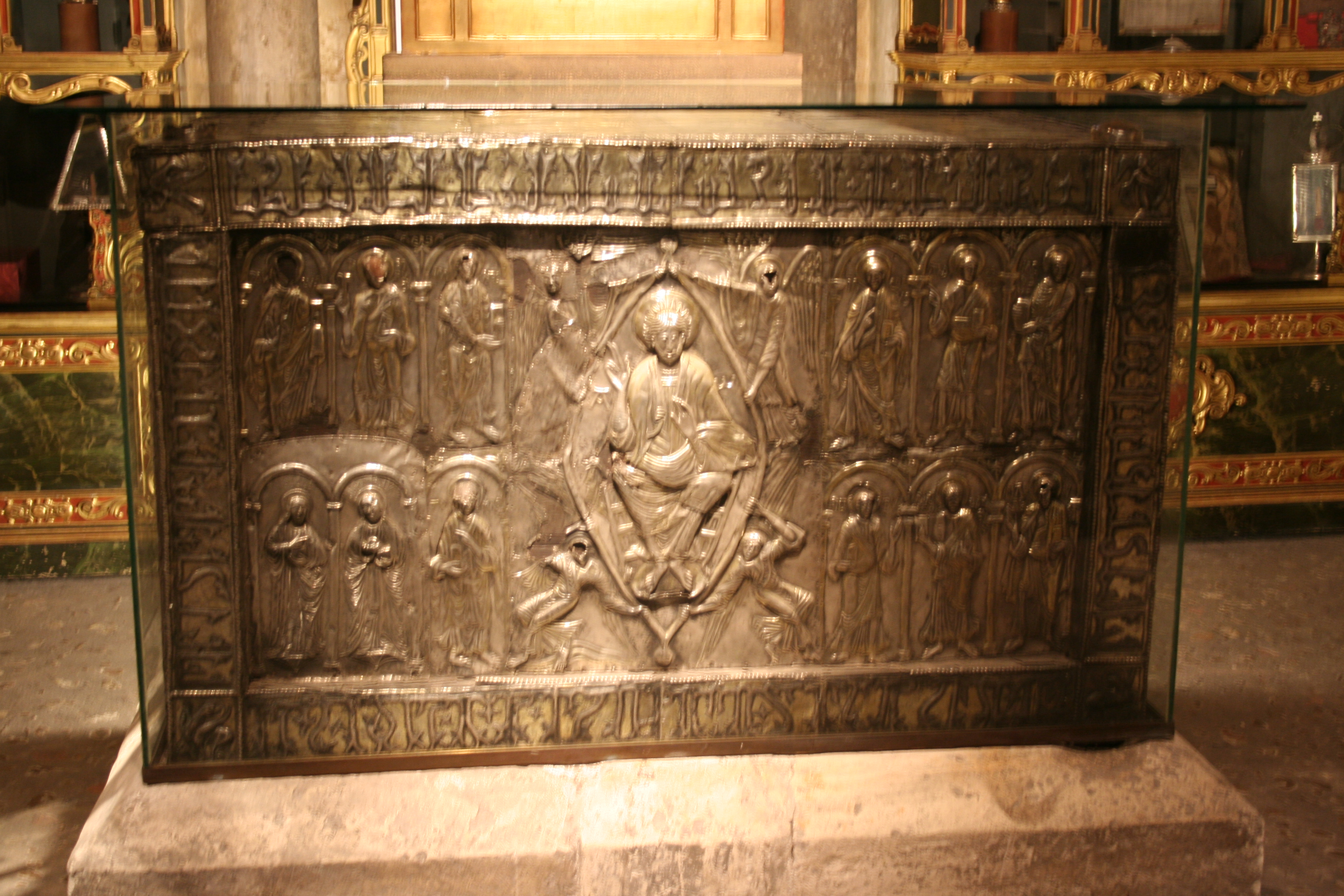 Arca Santa de Oviedo, conservada en el interior de la Cámara Santa de Oviedo.